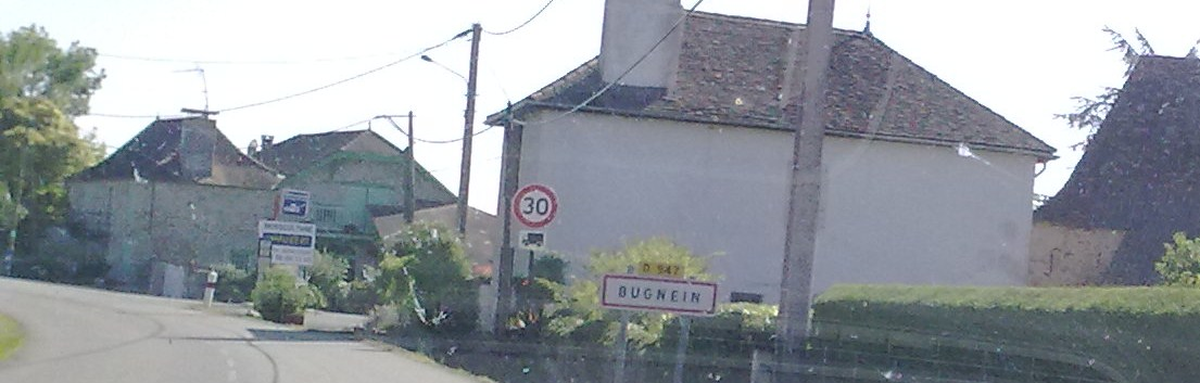 Bugnein le 18 juillet 2010, France.